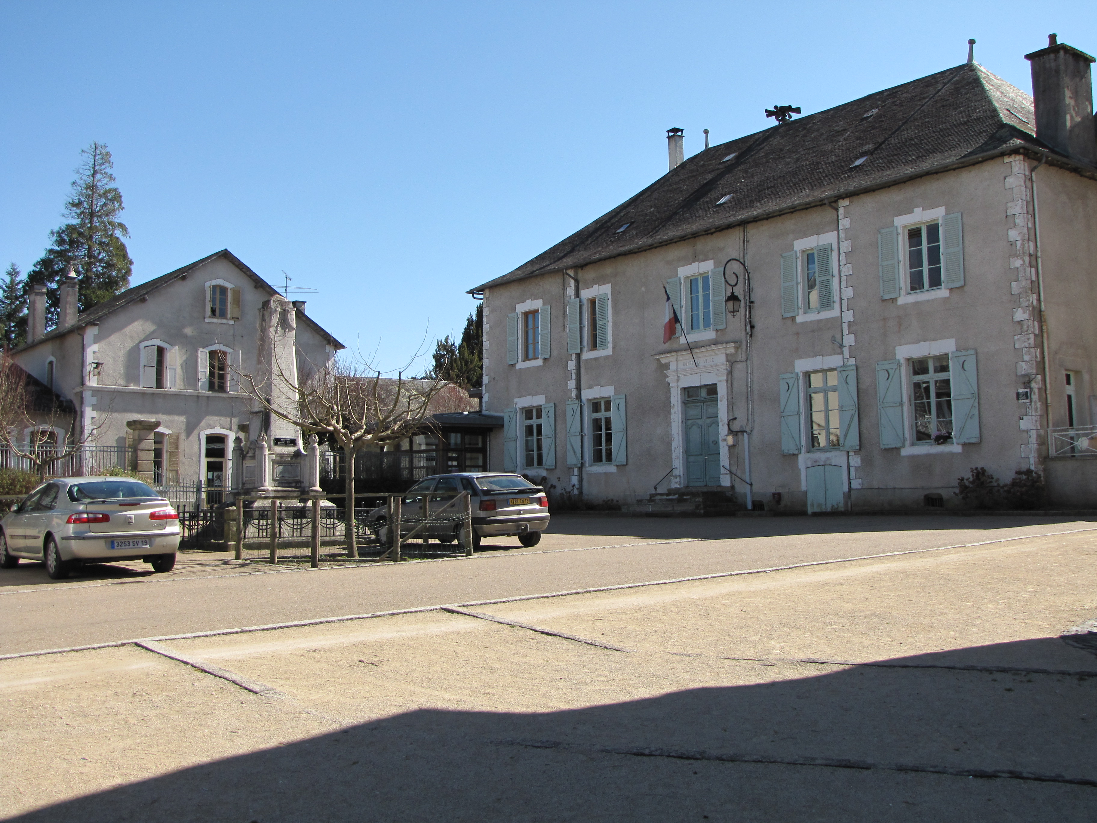 Mairie de Vigeois